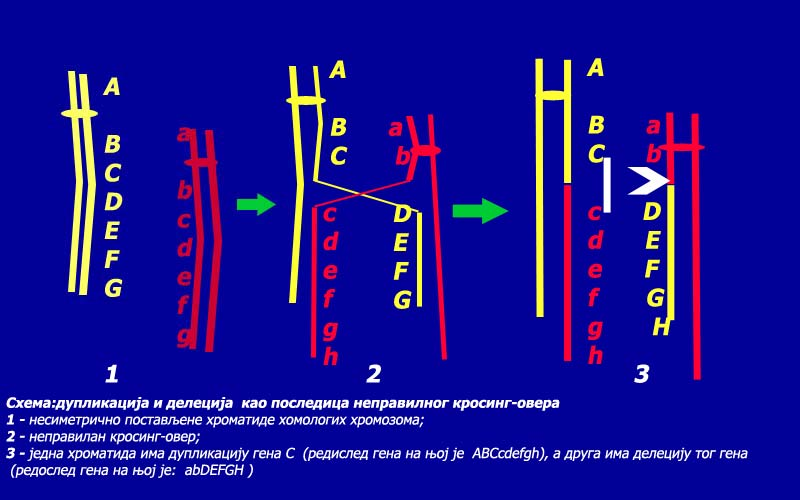 Description: Duplikacije i delecije kao poseledice nepravilnog krosing-overa Source: self-made